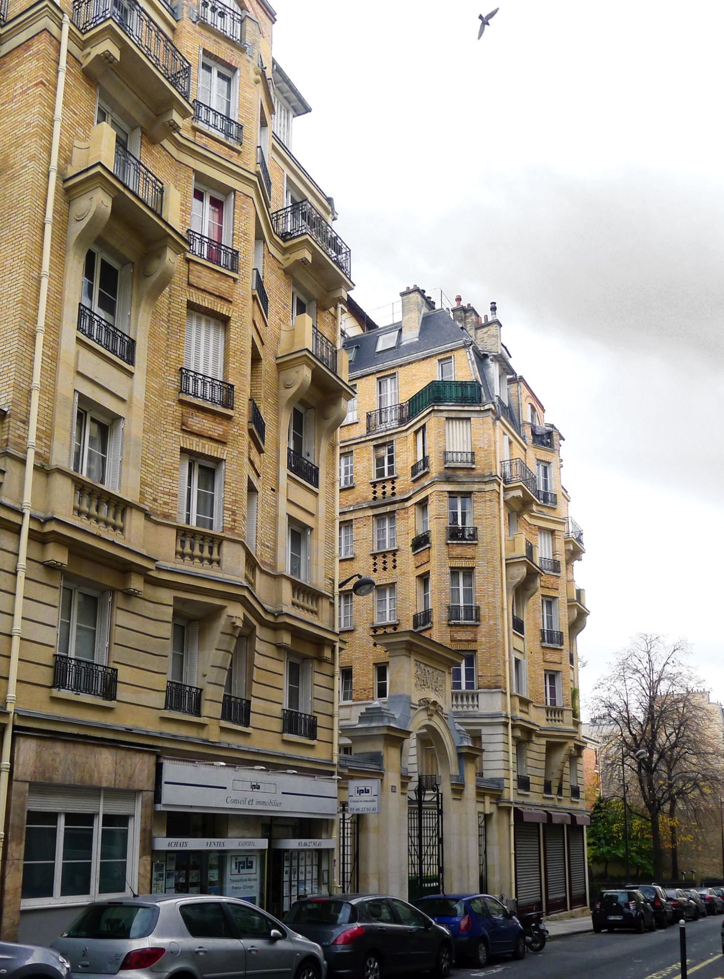 Rue Marcadet (n°205) - Paris XVIII